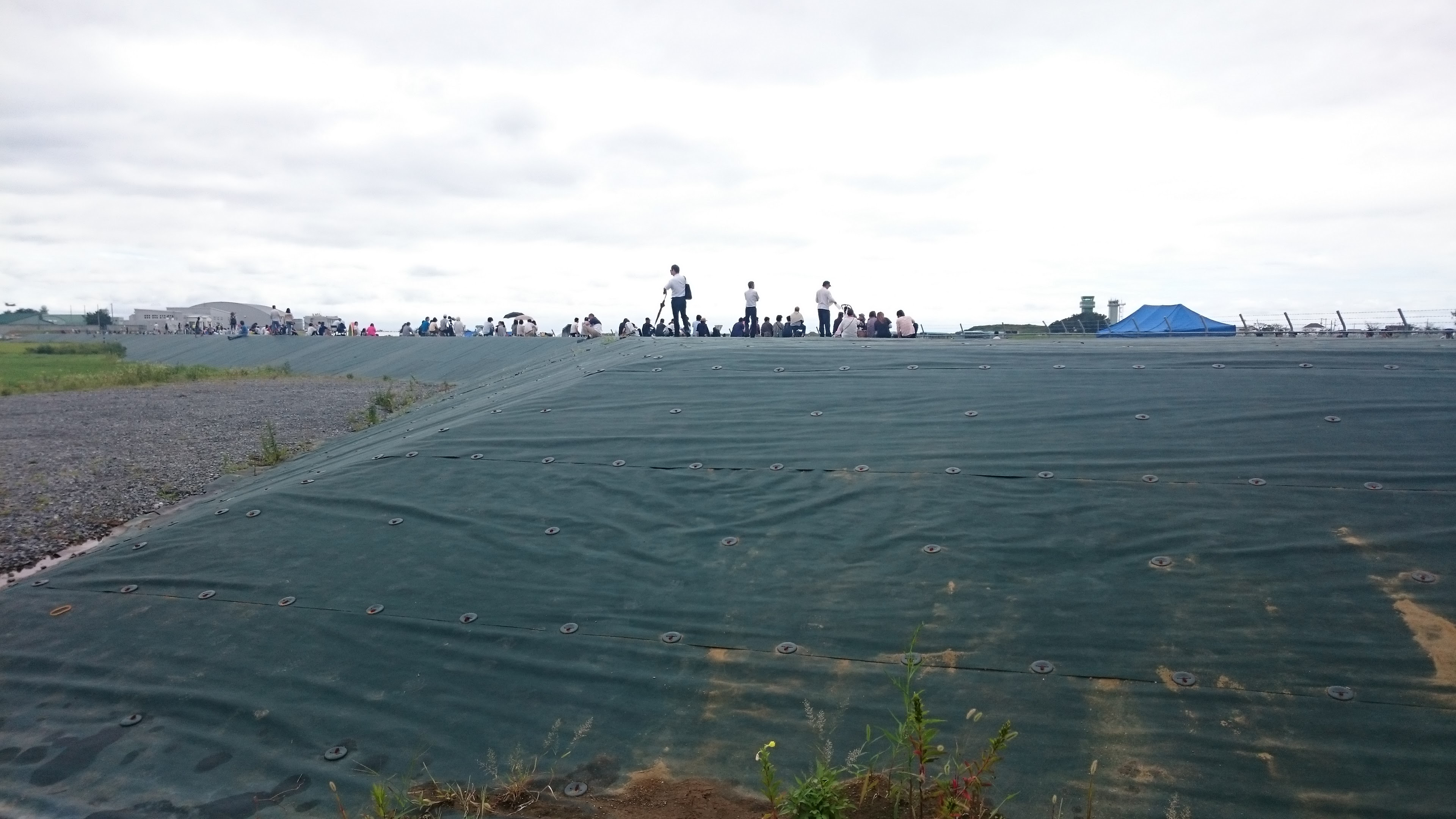 航空自衛隊松島基地の外周の防潮堤。